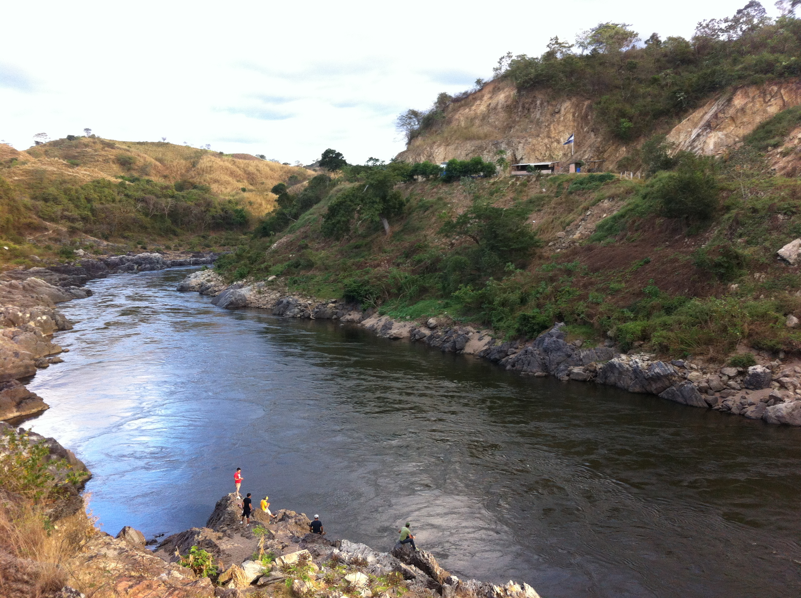 Rio Lempa